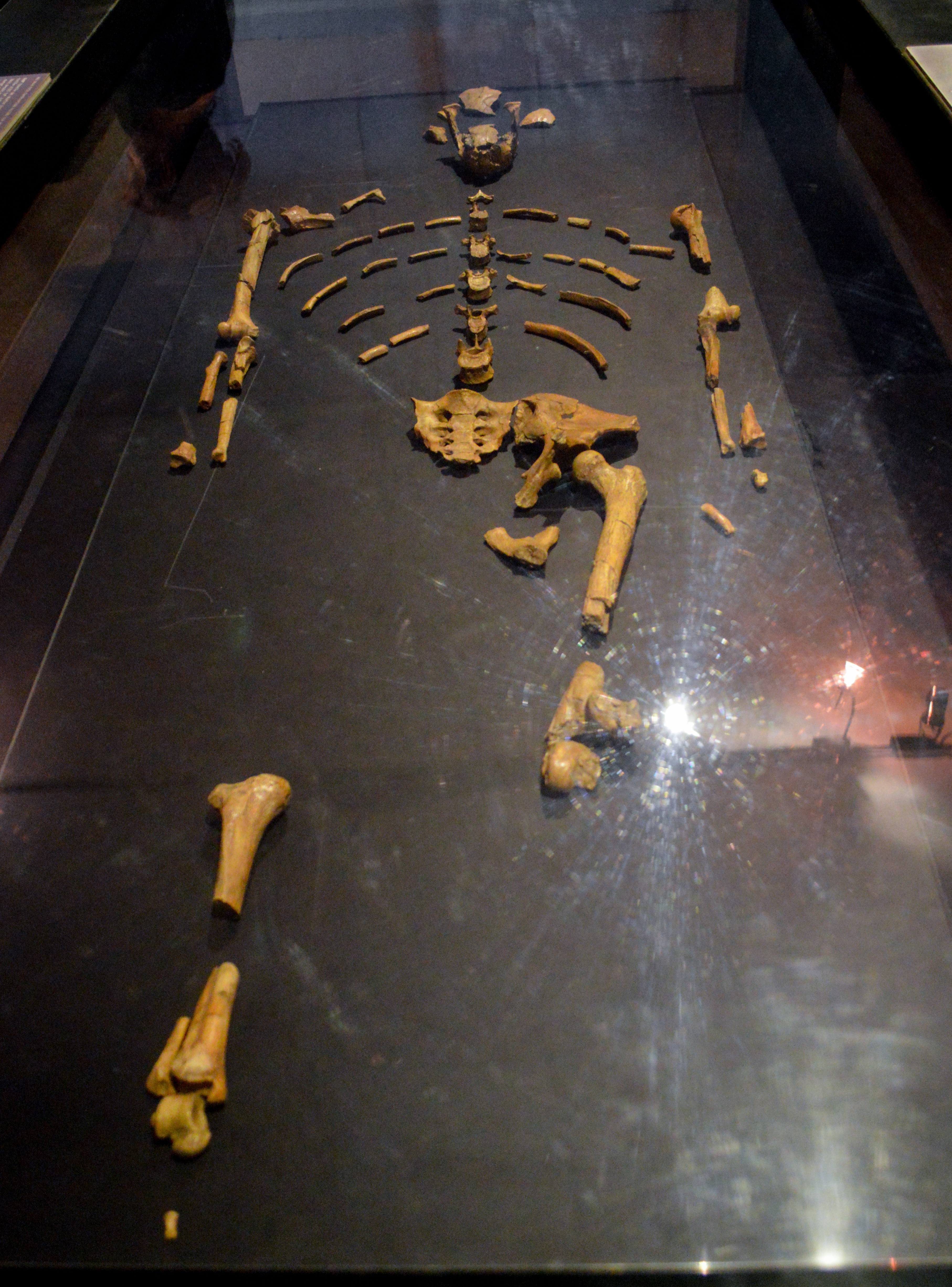 Grandma